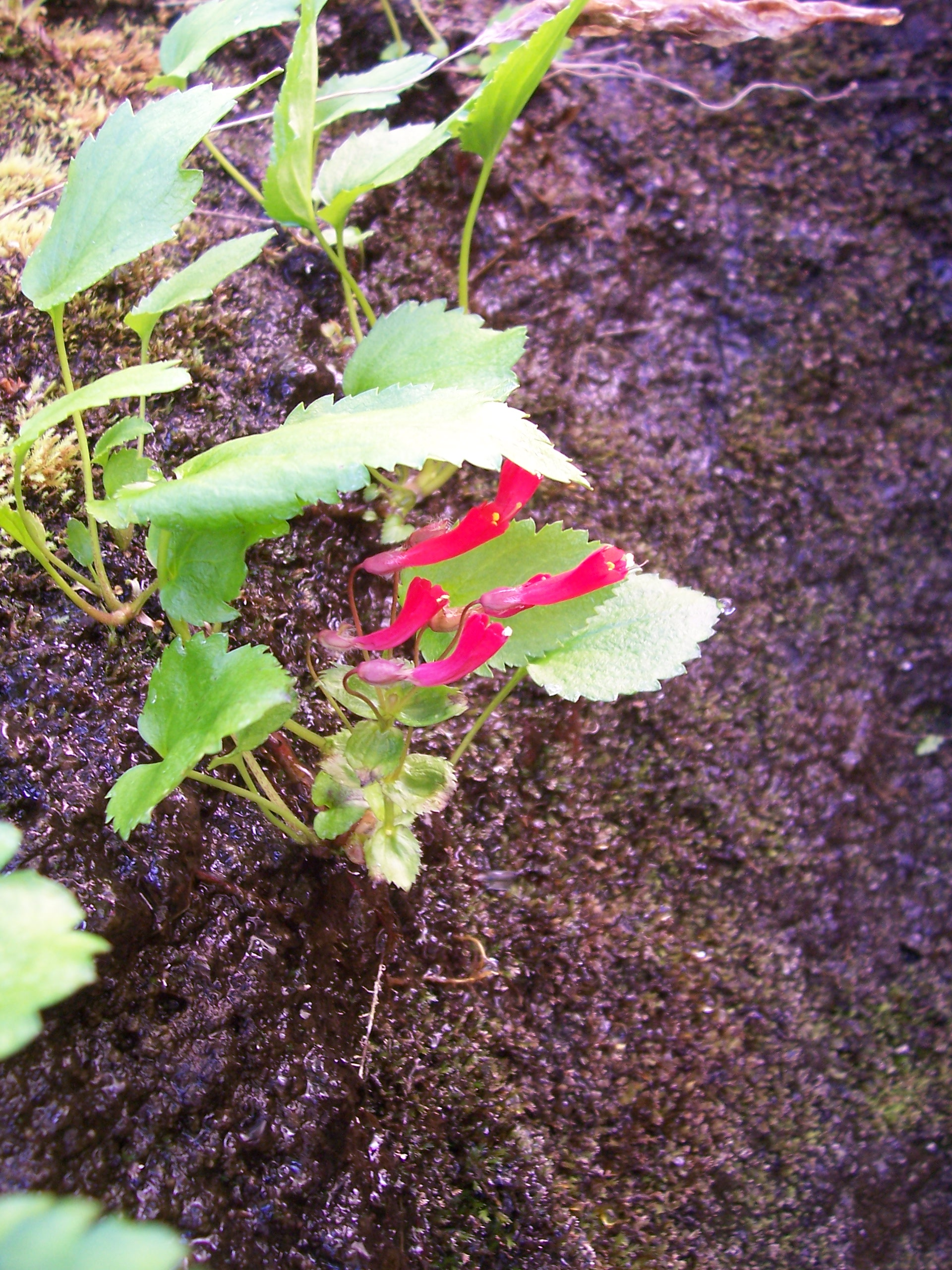 Ourisia ruelloides, Scrophulariaceae. Autor: (L.f.) Kuntze. Descripción original: L. fil. Suppl. Plant.: 271 (1781). Sinónimos: Chelone ruelloides L.fil.; O. glabra Mol.; O. magellanica C.F.Gaertn. Distribución y Hábitat: Flor de la Cascada crece entre la IX y XII región de Chile, hasta los 1.600m s.n.m. También en Argentina. Habita lugares sombríos y muy húmedos, generalmente sobre rocas a orillas de esteros. Descripción: Planta herbácea, perenne, que alcanza una altura de hasta 20cm. Hojas agrupadas en forma de roseta en la base de la planta, (pocas hojas opuestas en el tallo floral), de forma ovadas, con el borde irregularmente crenado. Lámina de 2-4 x 2-3cm. Flores hermafroditas, de color rojo, reunidas en inflorescencias terminales; flores de cerca de 2,5cm, cáliz formado por 5 sépalos, corola tubular terminada en 5 lóbulos; 4 estambres, 1 pistilo. El Fruto es una cápsula ovoide con numerosas semillas en su interior.